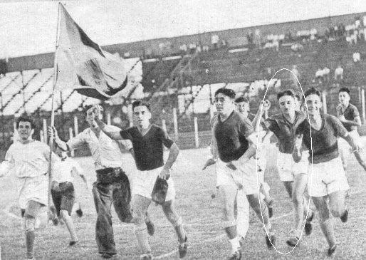 José Casalini dando la vuelta olímpica con la casaca de Central Córdoba, durante la obtención del Torneo del Litoral 1939.